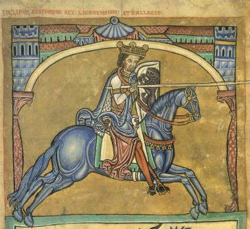 Alfonso IX de León.